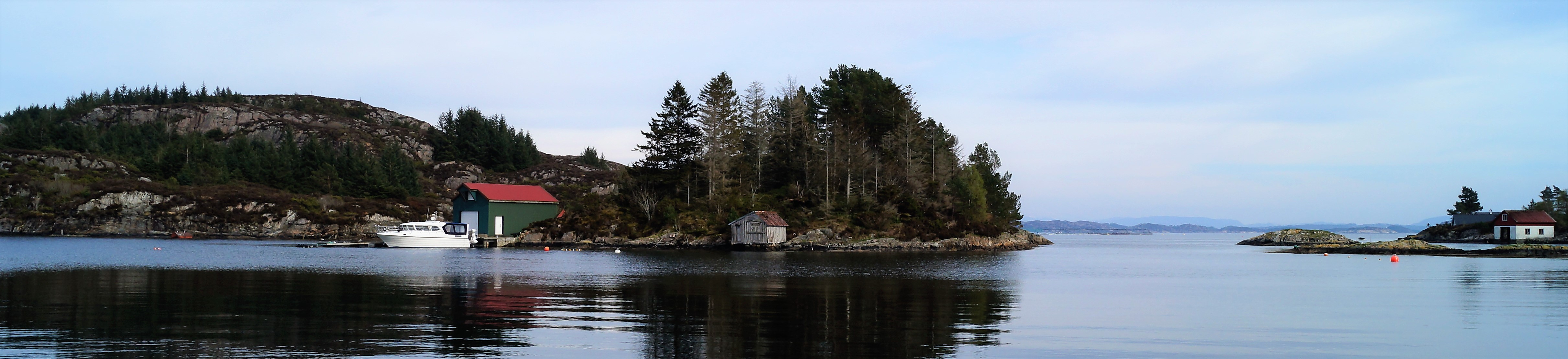 Sundet som leder ut av Forlandsvågen